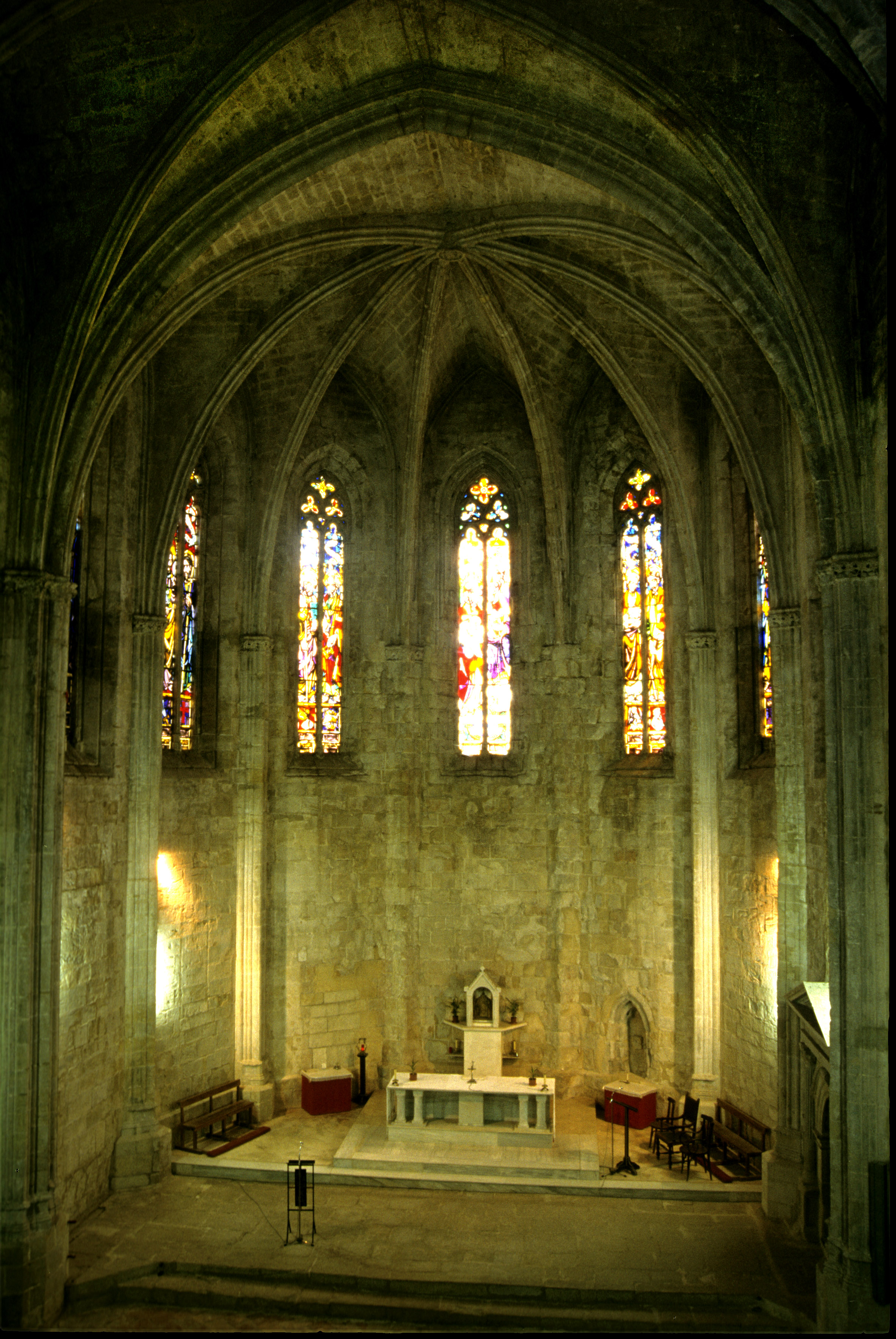 Horta de Sant Joan (Terra Alta). Interior de l'església parroquial. Capçalera.